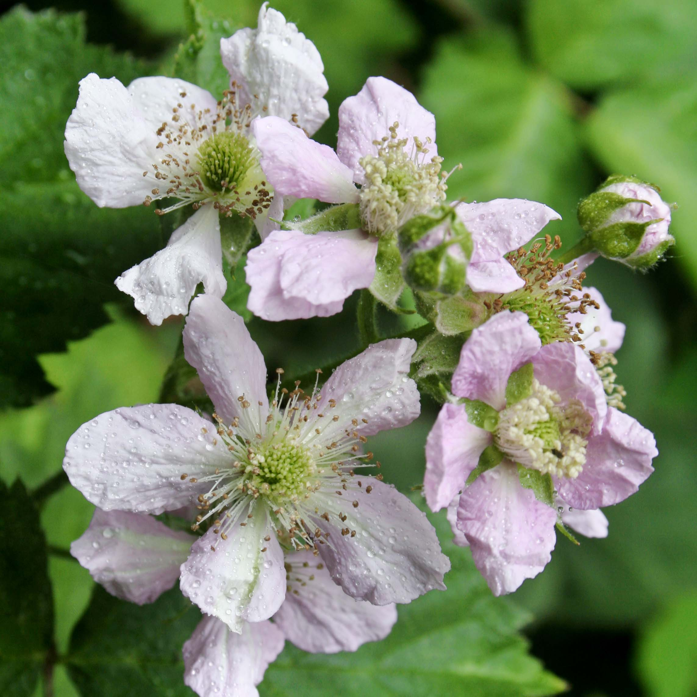 Szeder (Rubus) virágzata (Kaposvár)